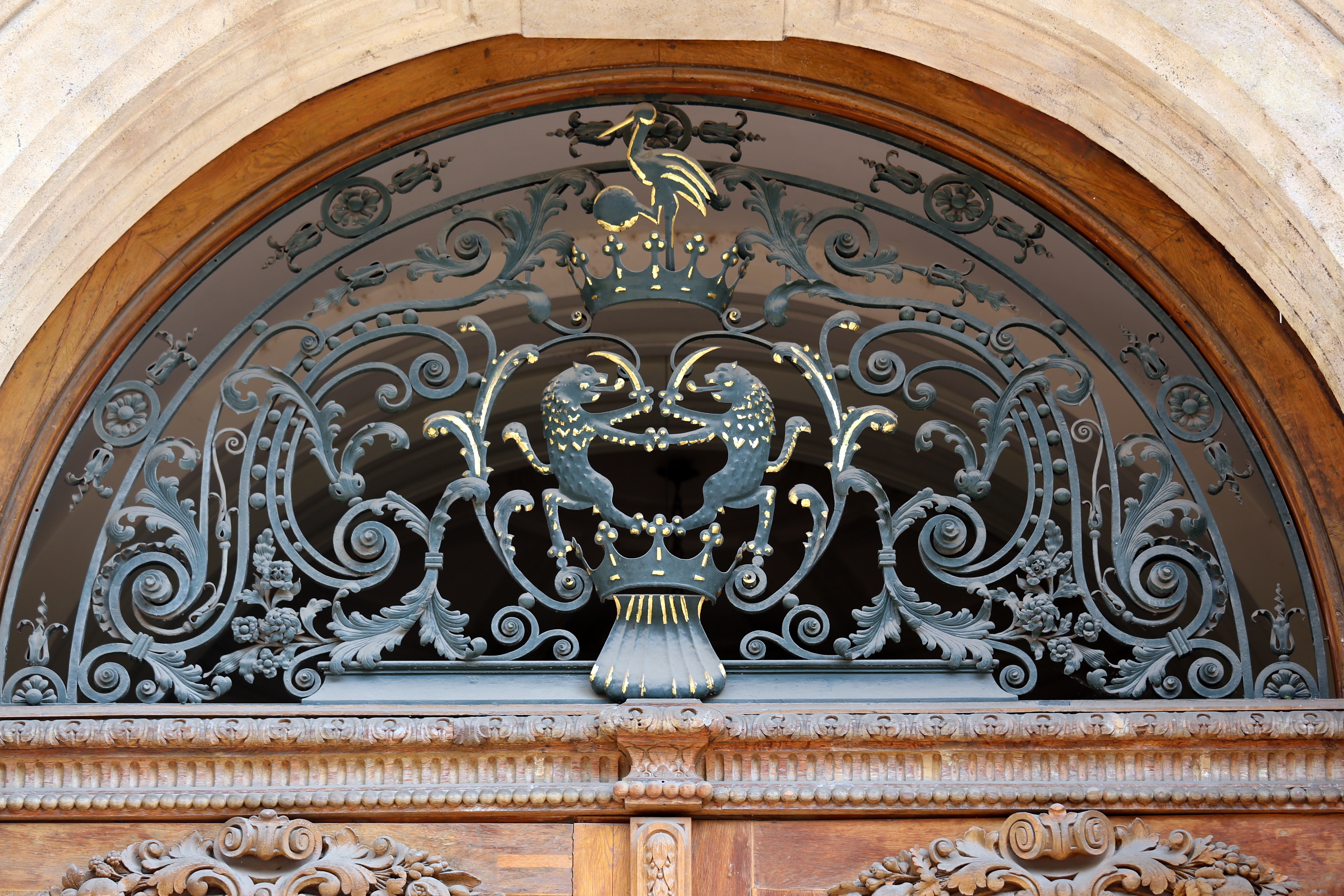 Festetics-palota This is a photo of a monument in Hungary. Identifier: 951